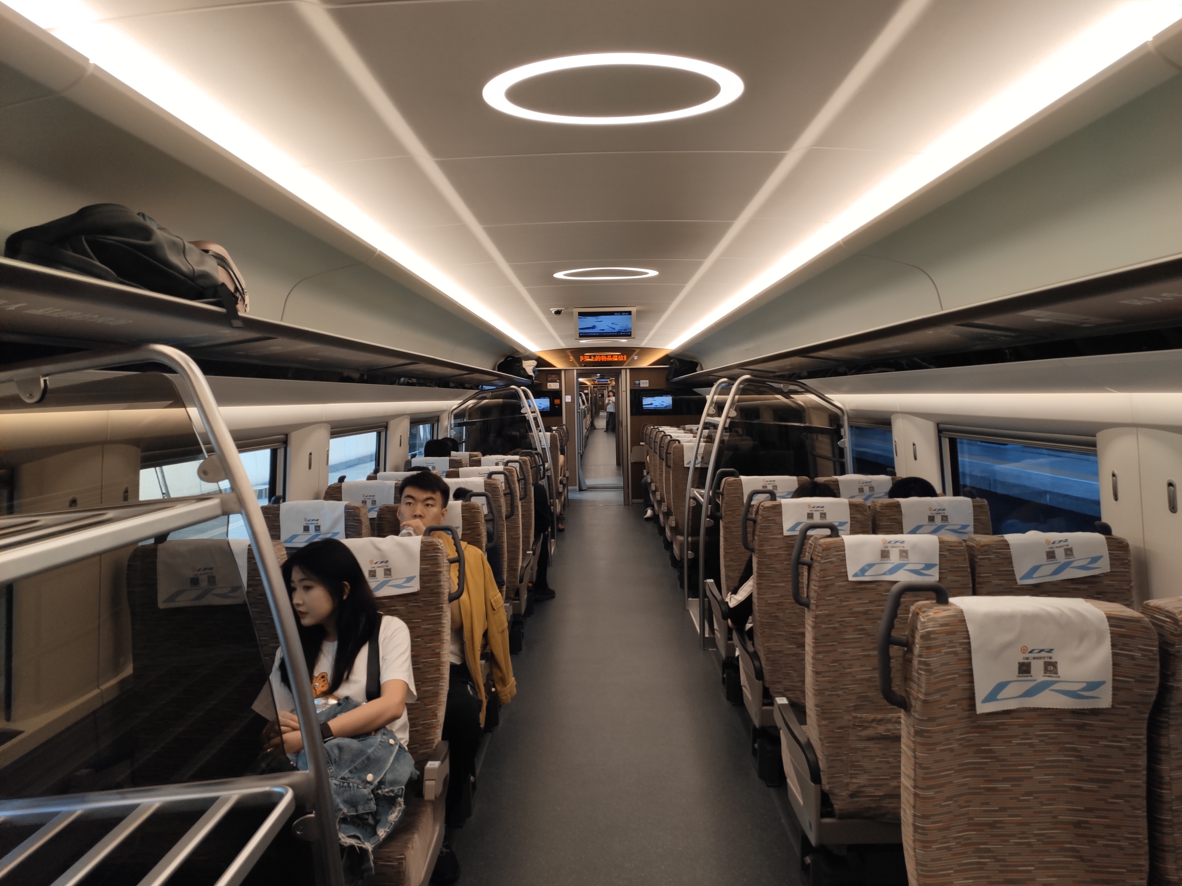 京雄城际（划掉）大兴机场客专专用的2+2座位的二等座车——这次连小桌板和旋转装置都没了，可还是有餐车